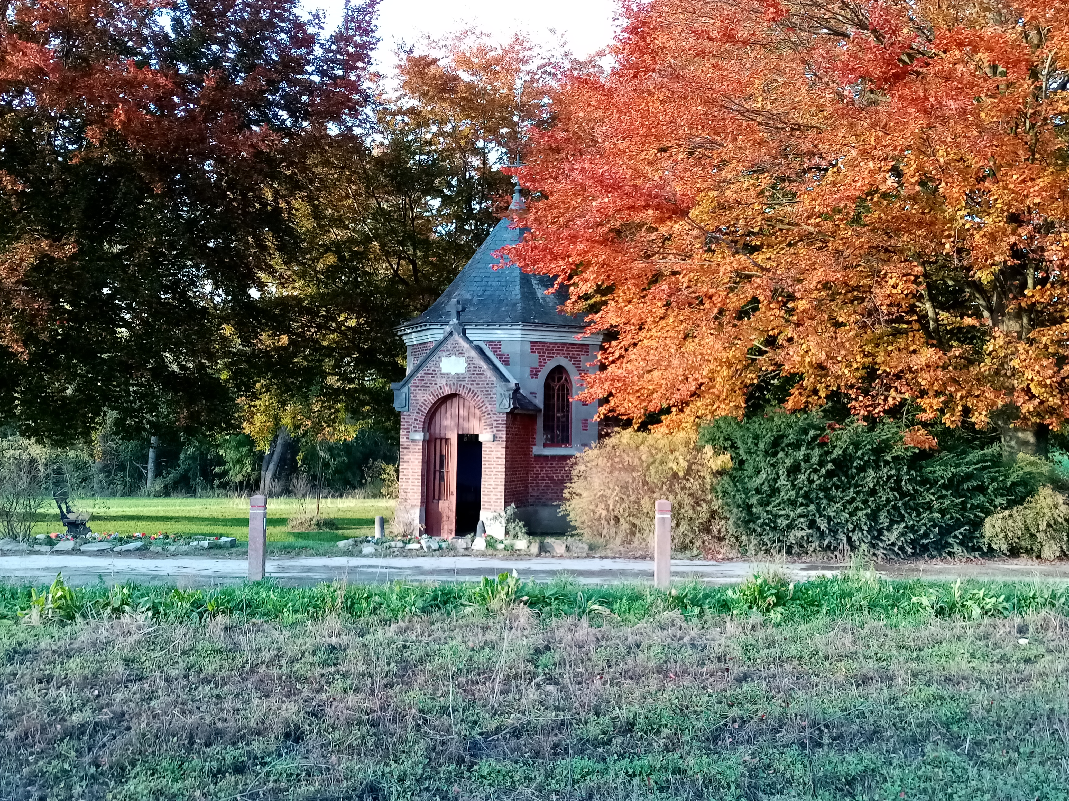 La Chapelle du Mont Serrat à Onoz (Vierge Noire)